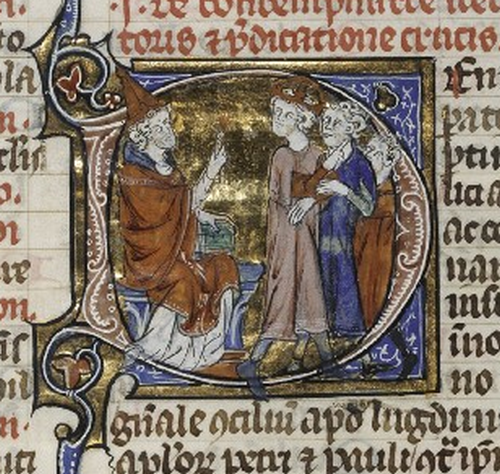 Excommunication de Frédéric II